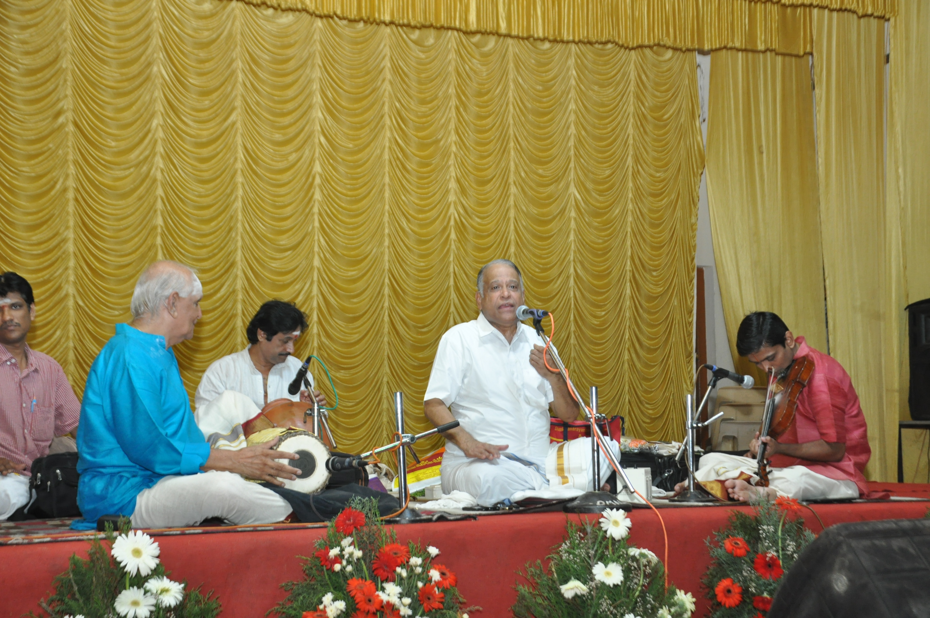 ഉമയാള്‍പുരം കെ. ശിവരാമനോടൊപ്പം ഒ.എസ്. ത്യാഗരാജന്‍